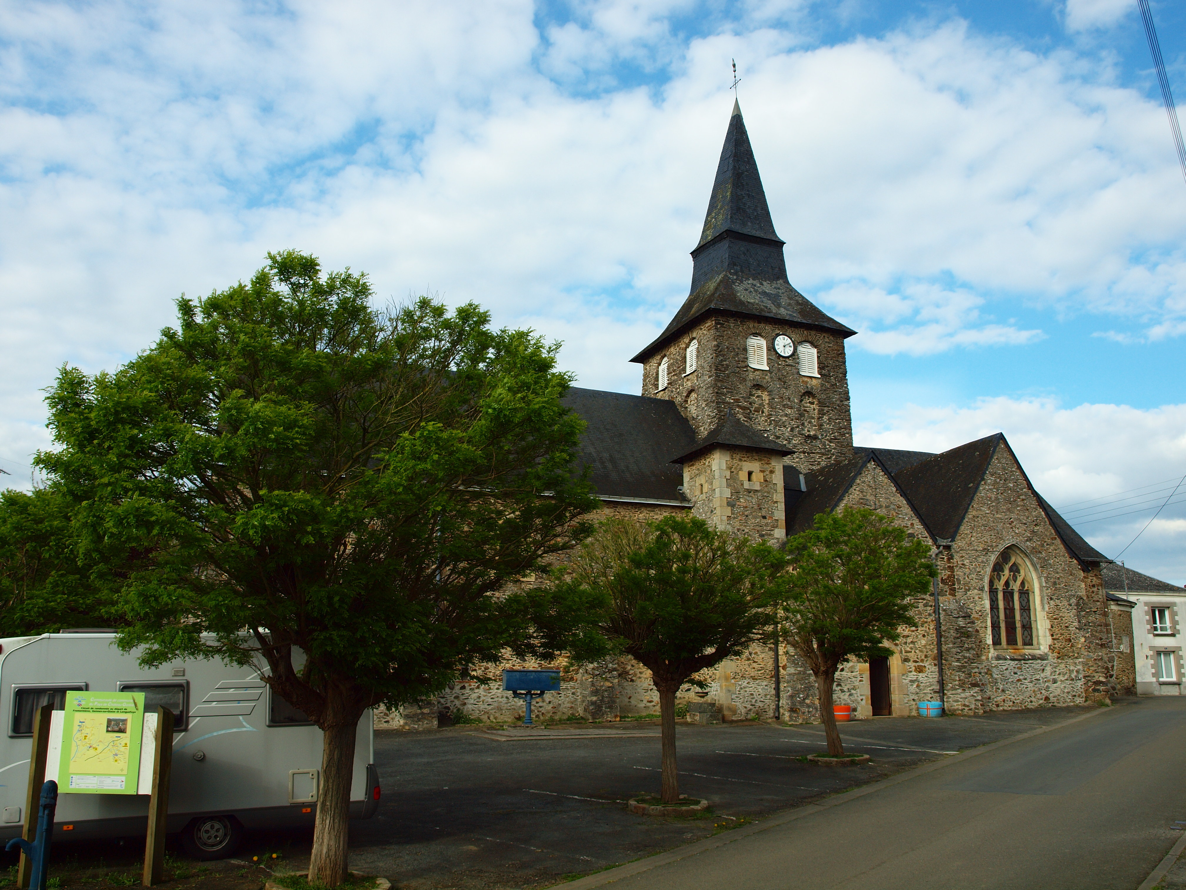 Église de Fromentières (Mayenne, France)